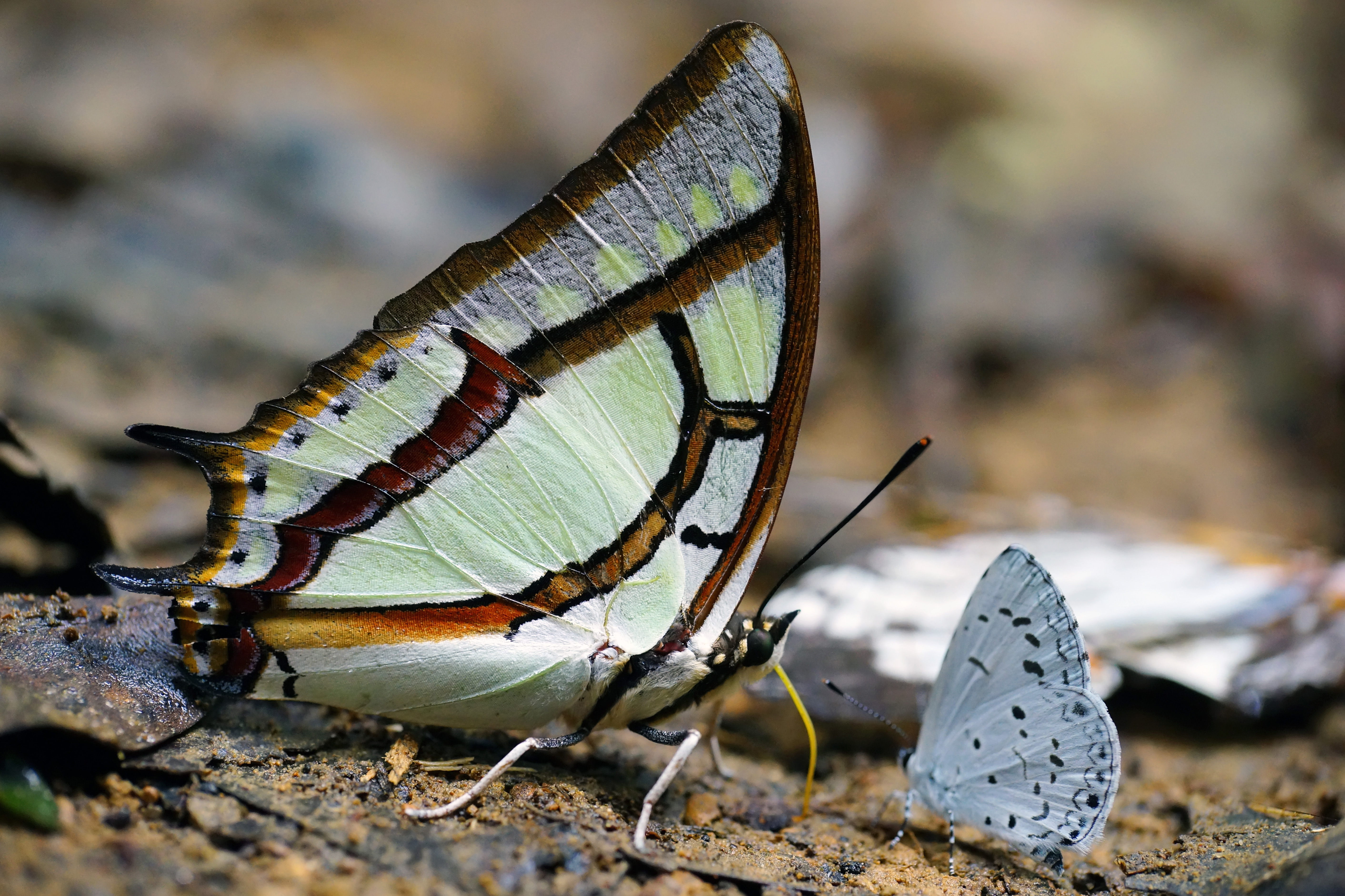 中文（台灣）: 小雙尾蛺蝶 Polyura narcaea meghaduta